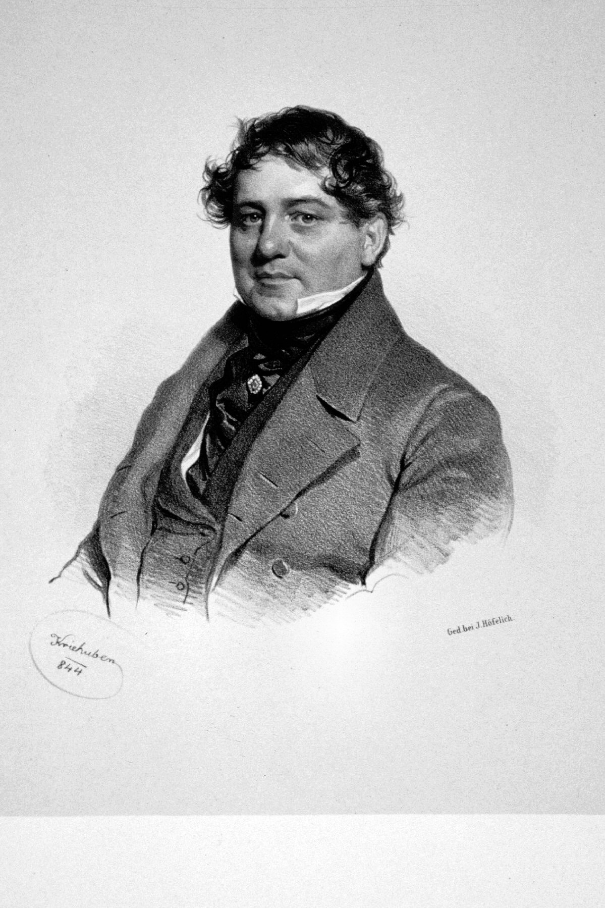 Anton Forti (1790-1859) österreichischer Musiker und erfolgreicher Sänger.